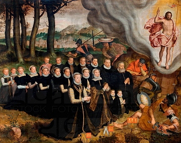 Epitaafschilderij voor Zeghere van Male en zijn gezin (1578). Door Pieter Pourbus. Sint-Jacobskerk, Brugge.